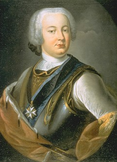 Ludwig Ernst von Braunschweig-Lüneburg-Bevern (1718-1788)